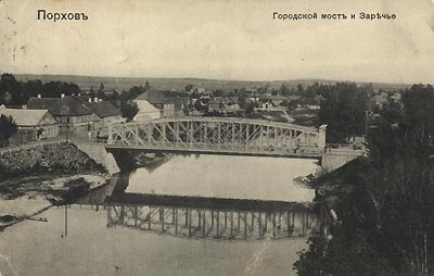 Мост в Порхове. Вид сверху. Дореволюционная фотография